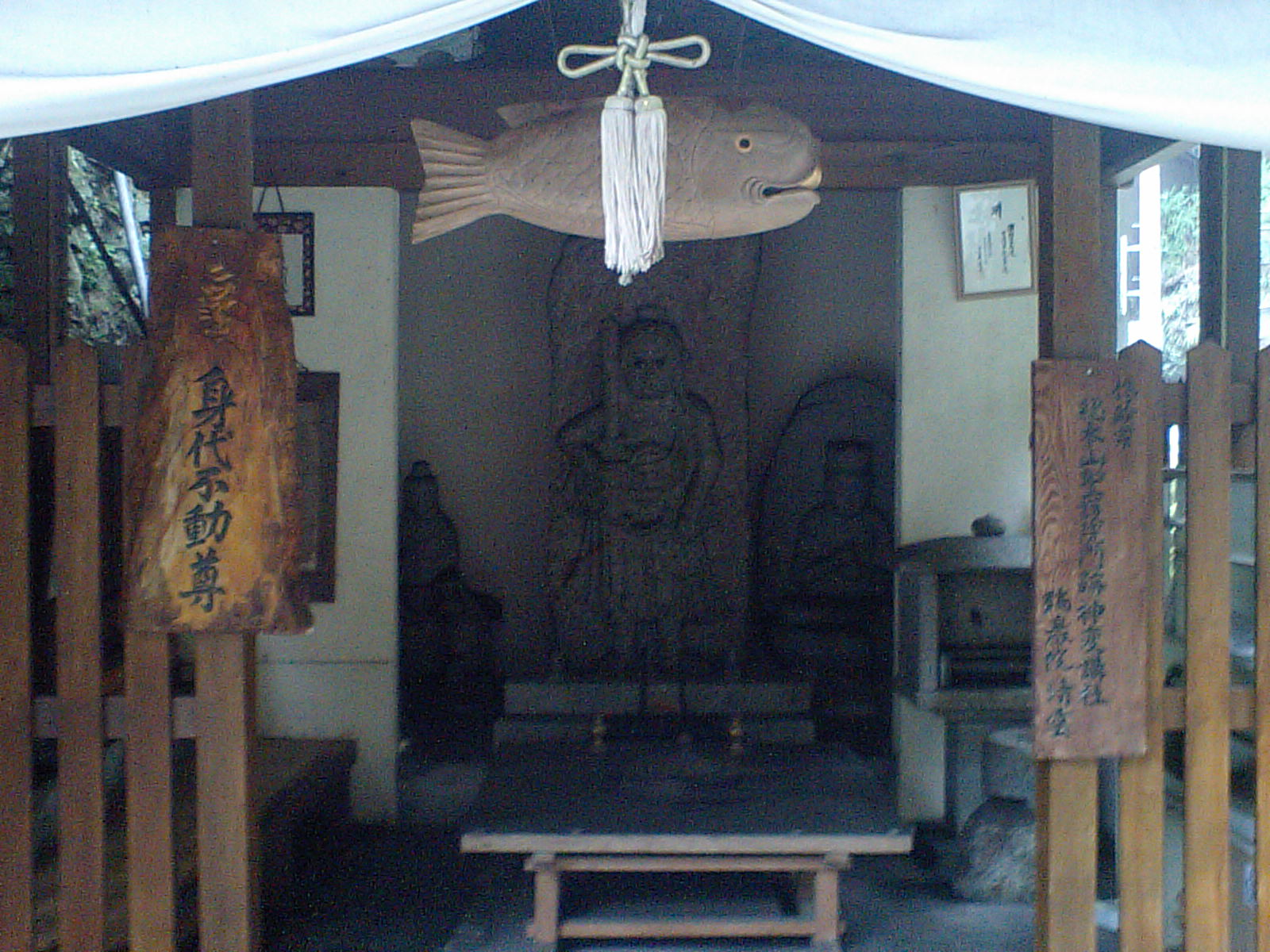 北白川山間部の身代わり不動尊。複数有るが、これは最も街道(志賀越道)に近いもの。